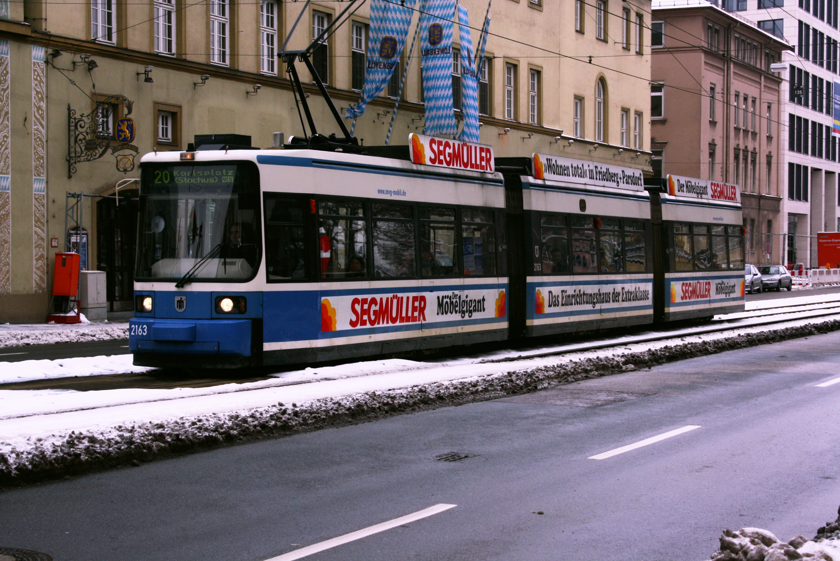 Straßenbahn am Stiglmairplatz in München. Im Hintergrund der Löwenbräukeller.